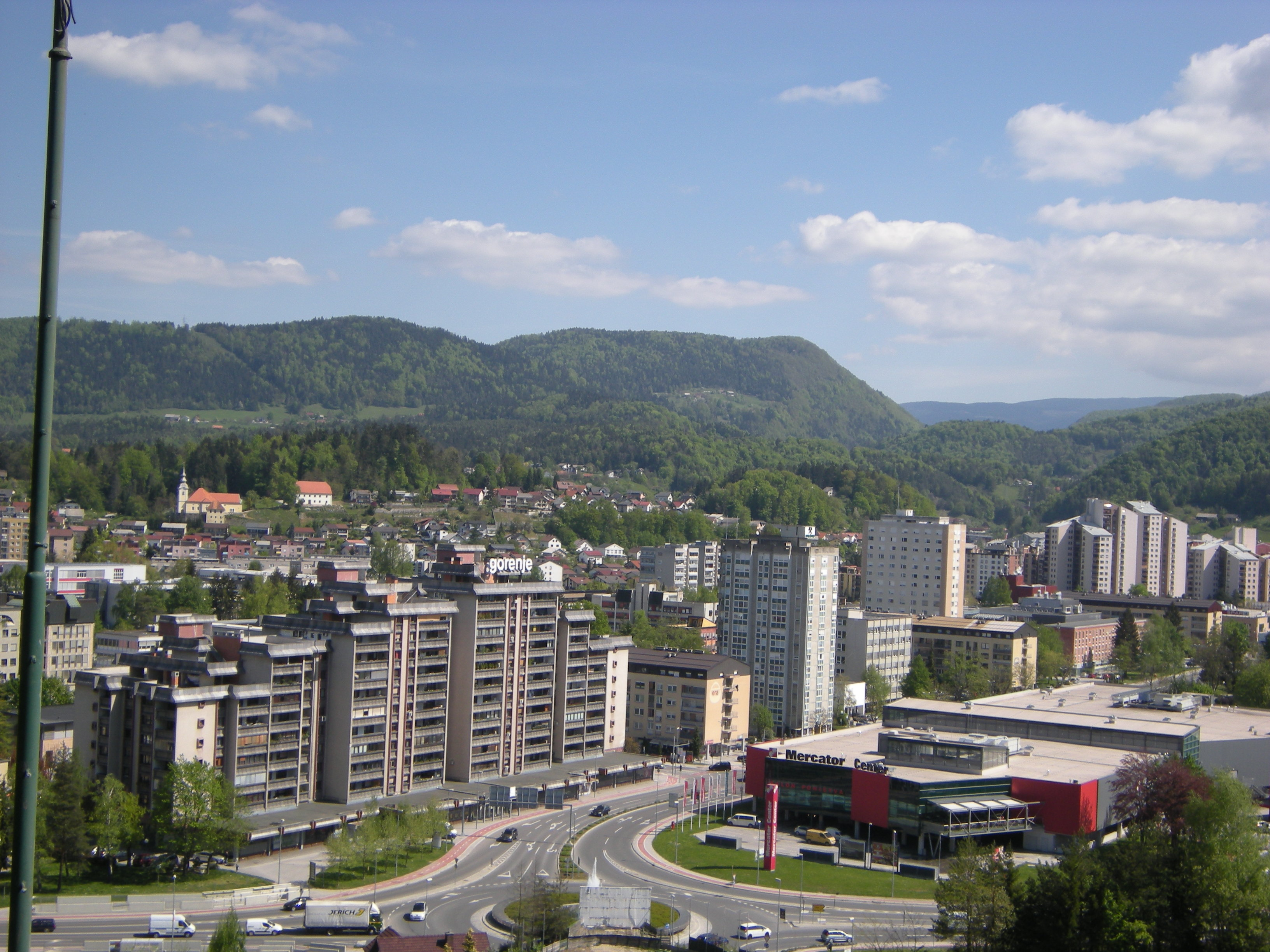 Pogled na Velenje